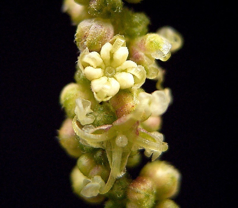 Urtica dioica